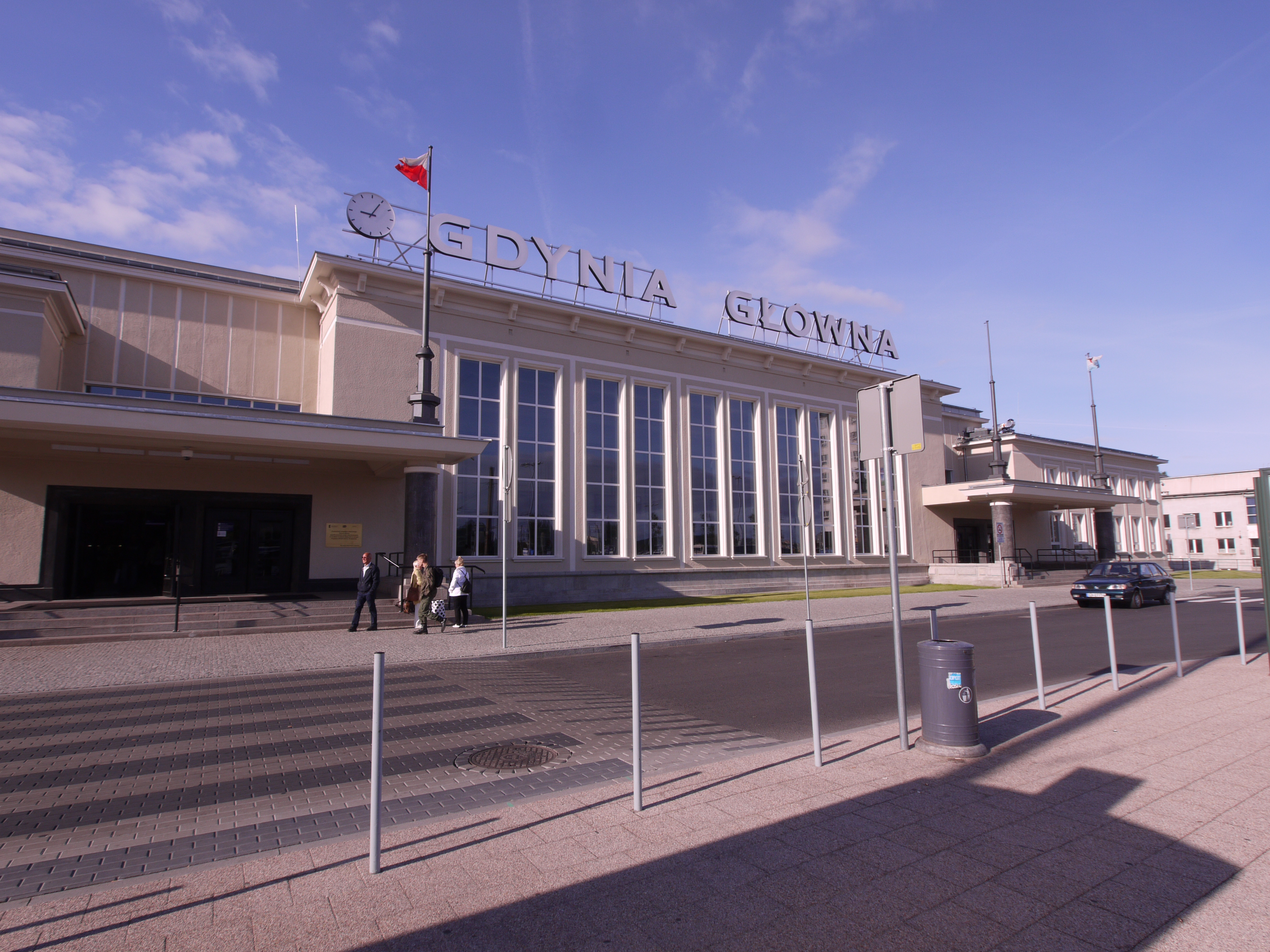 Gdynia Główna - budynek dworca głównego, po remoncie przeprowadzonym w latach 2010-2012. Widok od strony Placu Konstytucji. Plac Konstytucji 1, Gdynia